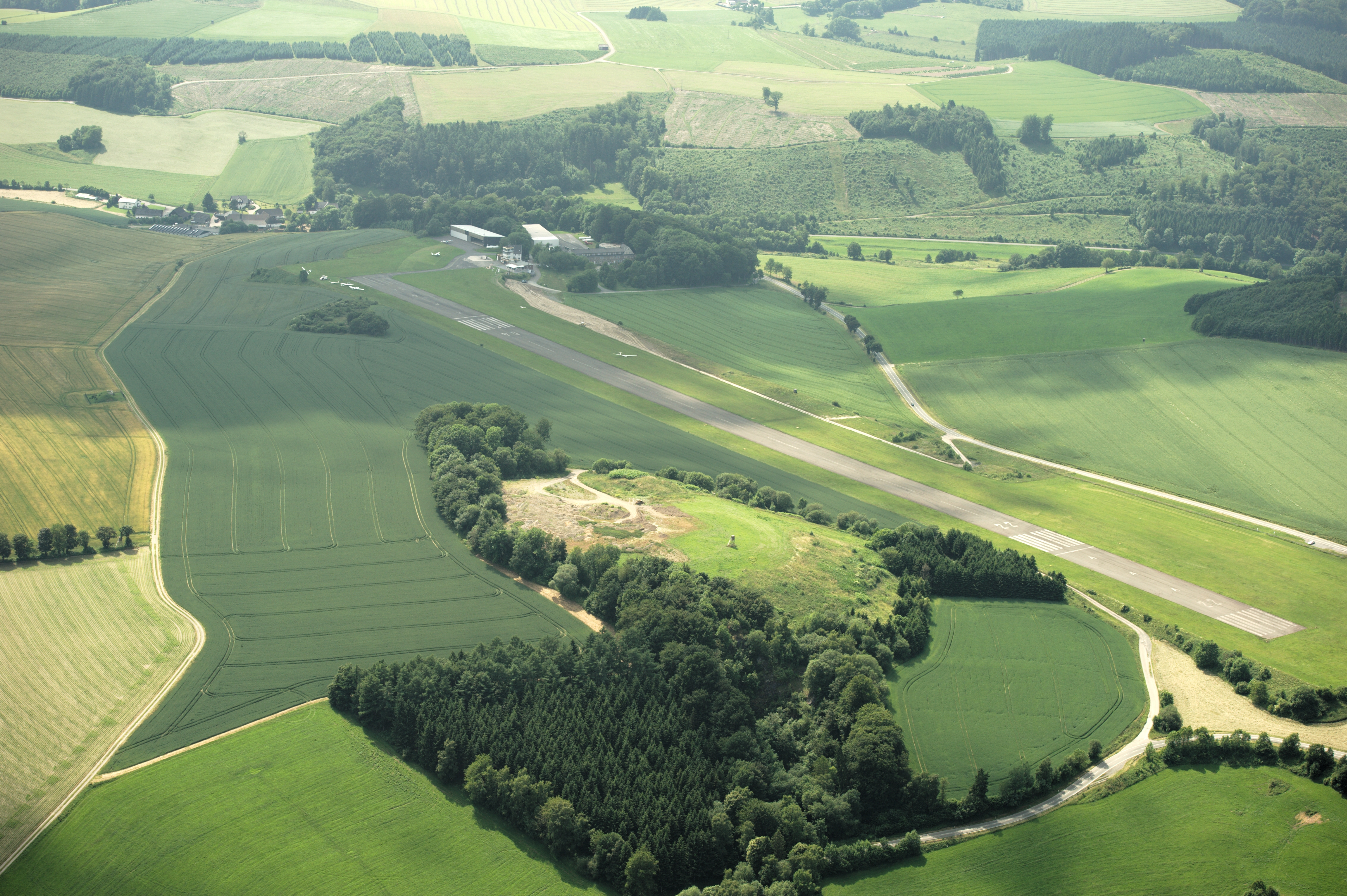 Fotoflug Sauerland-Ost - Flugplatz Meschede-Schüren, im Vordergrund das Naturschutzgebiet „Steinbruch Schüren“